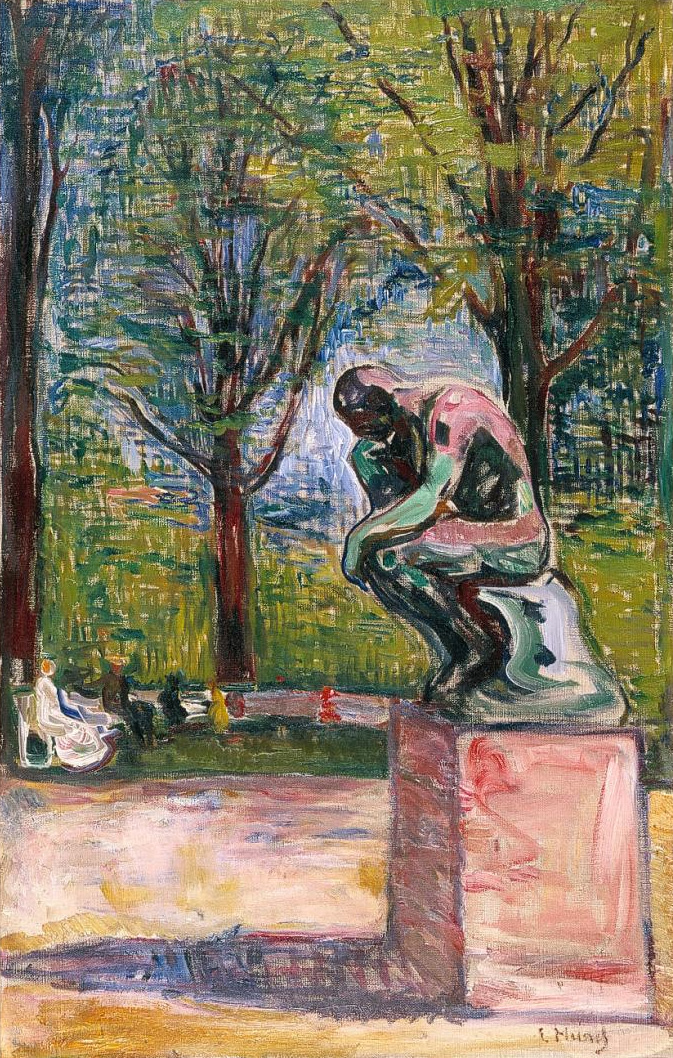 Edvard Munch, Le Penseur de Rodin dans le parc du Docteur Linde à Lübeck, 1907